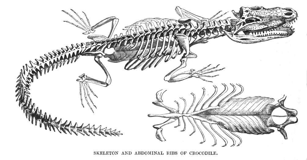 Crocodyle skeleton